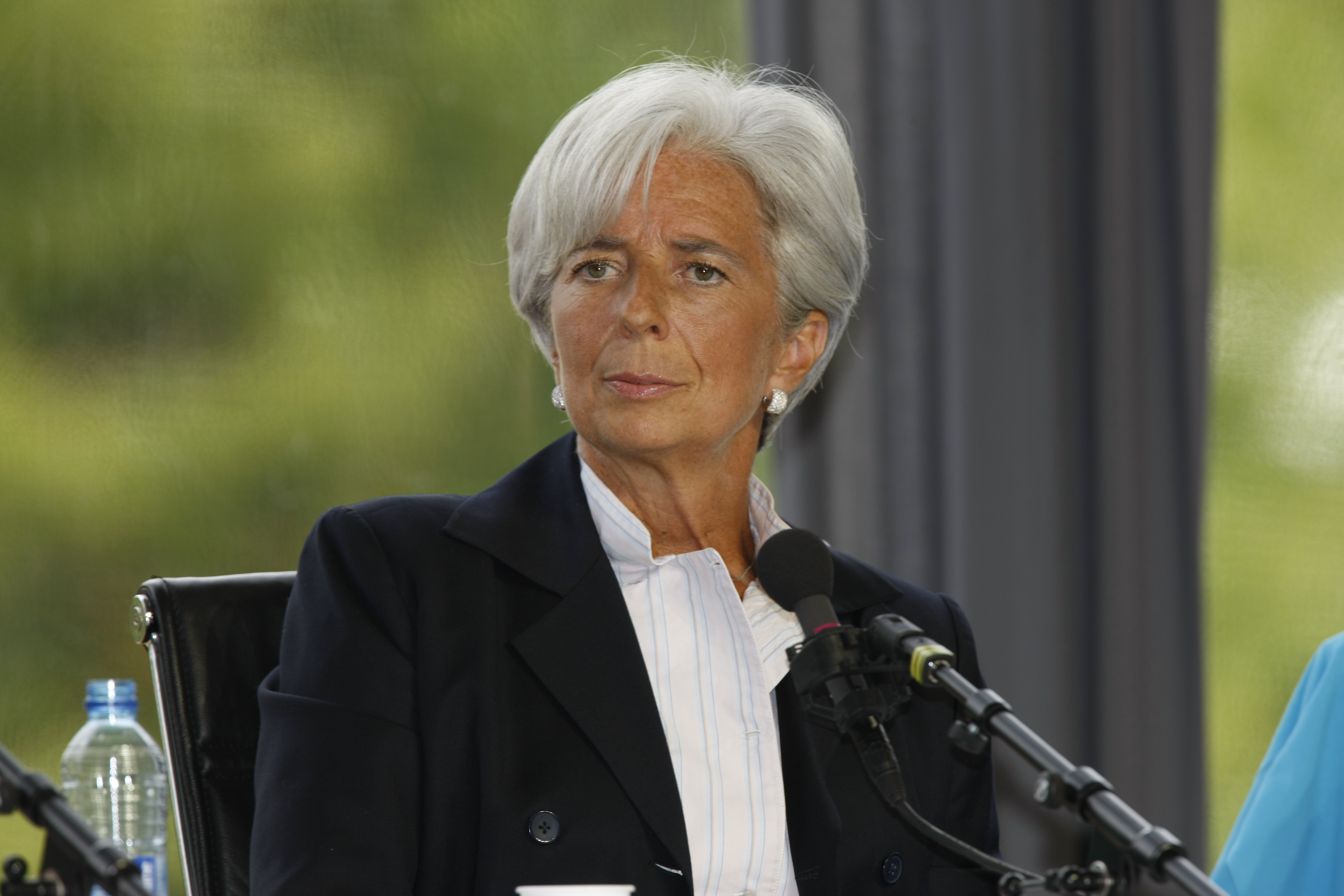 Christine Lagarde à l'Université d'été du MEDEF en 2009.